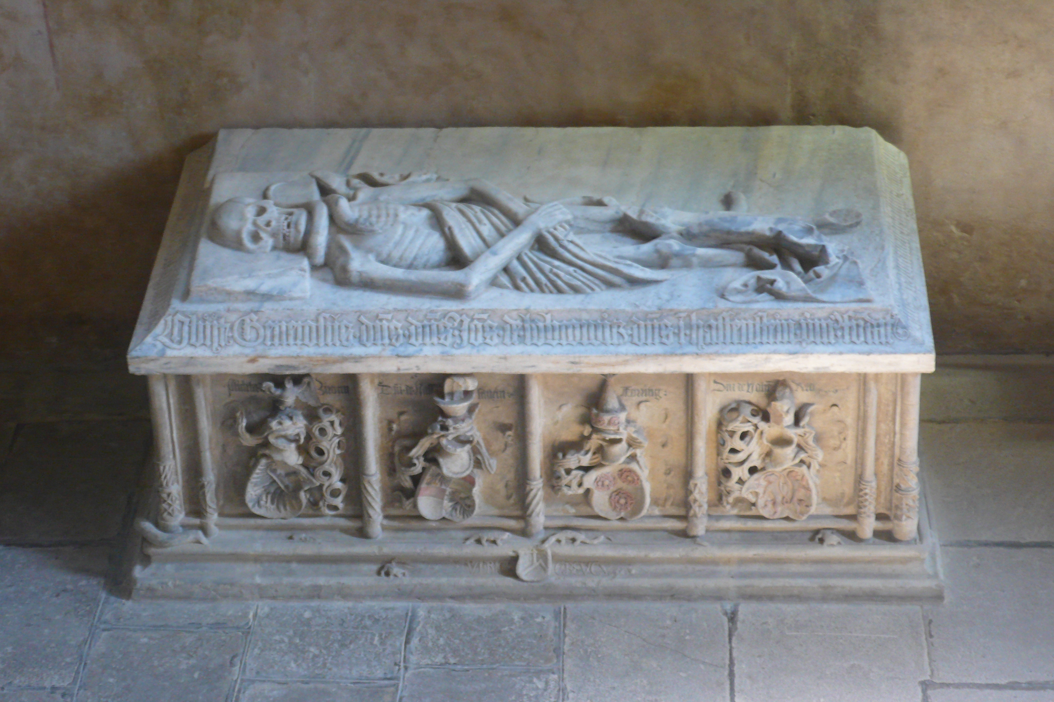 Náhrobek (tumba) Jana Hasištejnského z Lobkowicz. Autor: sochař Ulrich Creutz, kolem roku 1516 (klášterní kostel Čtrnácti sv. Pomocníků, Kadaň)